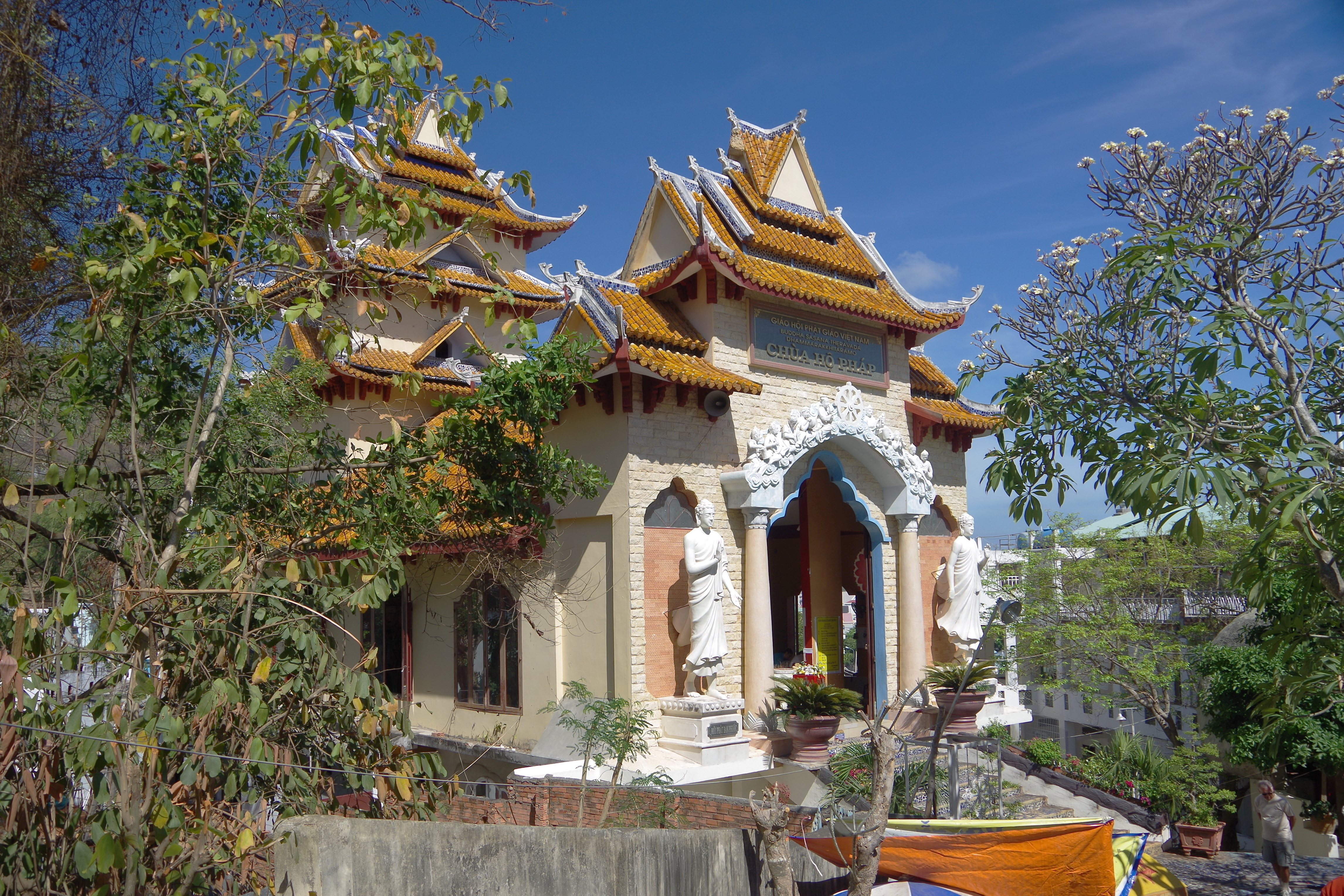 Tempel Thich Ca Phat Dai